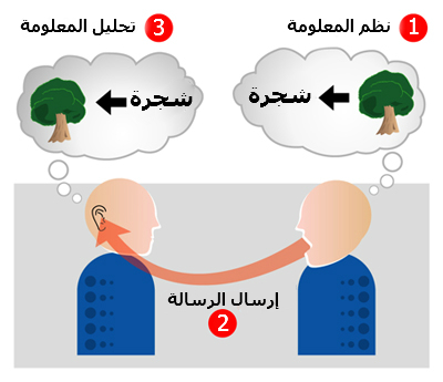 رسمٌ توضيحي لِمراحل التواصل بين شخصين.